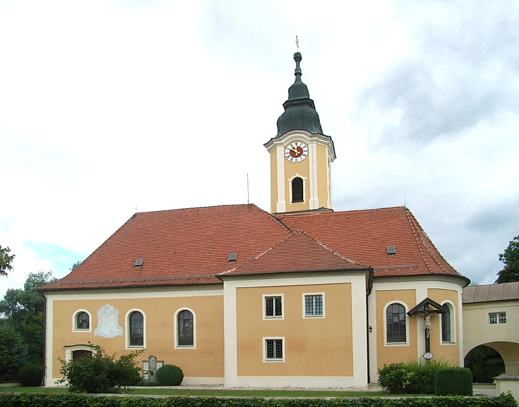 Die katholische Pfarrkirche Maria Unbefleckte Empfängnis in Adldorf